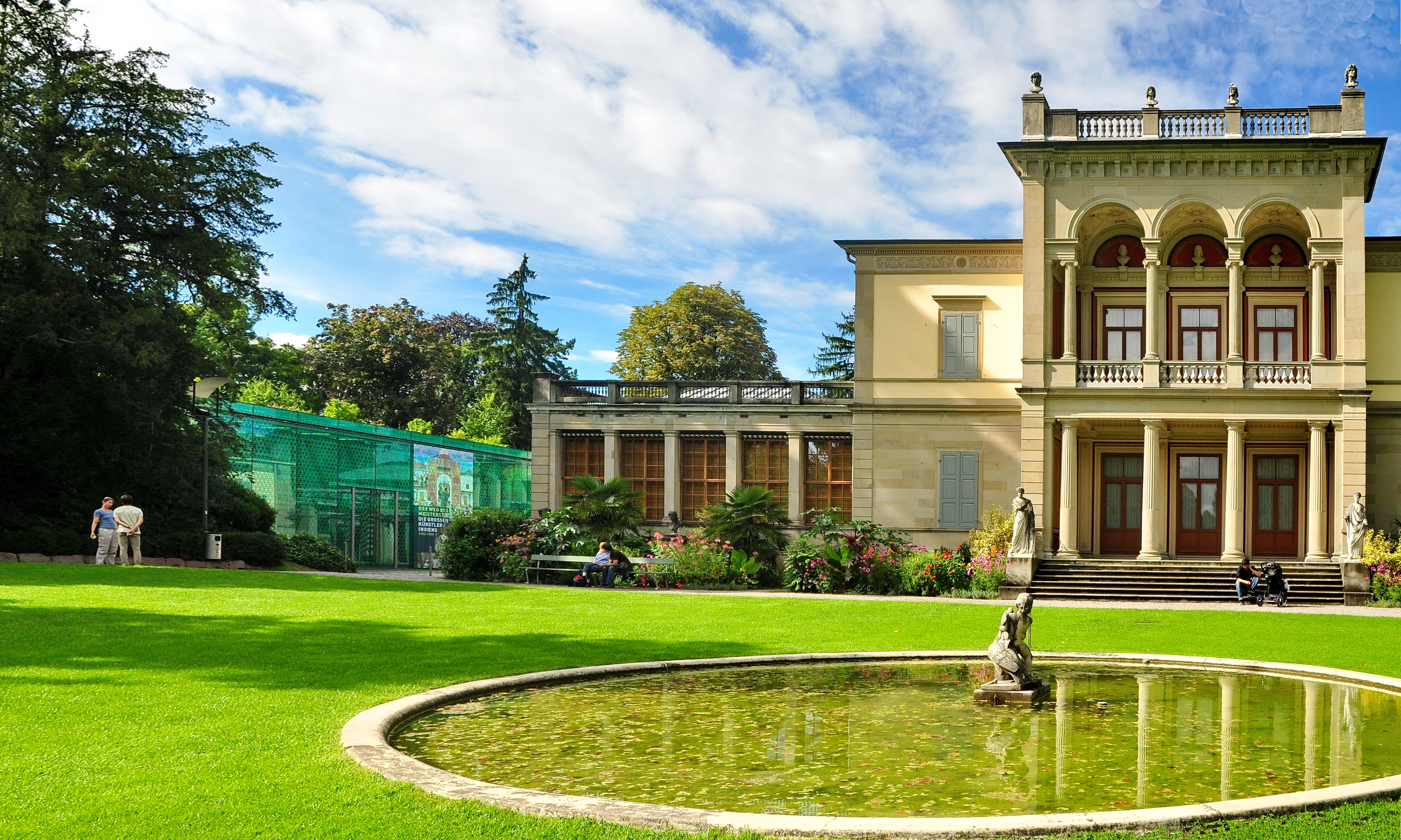 Museum Rietberg, Villa Wesendonck in Zürich (Switzerland)